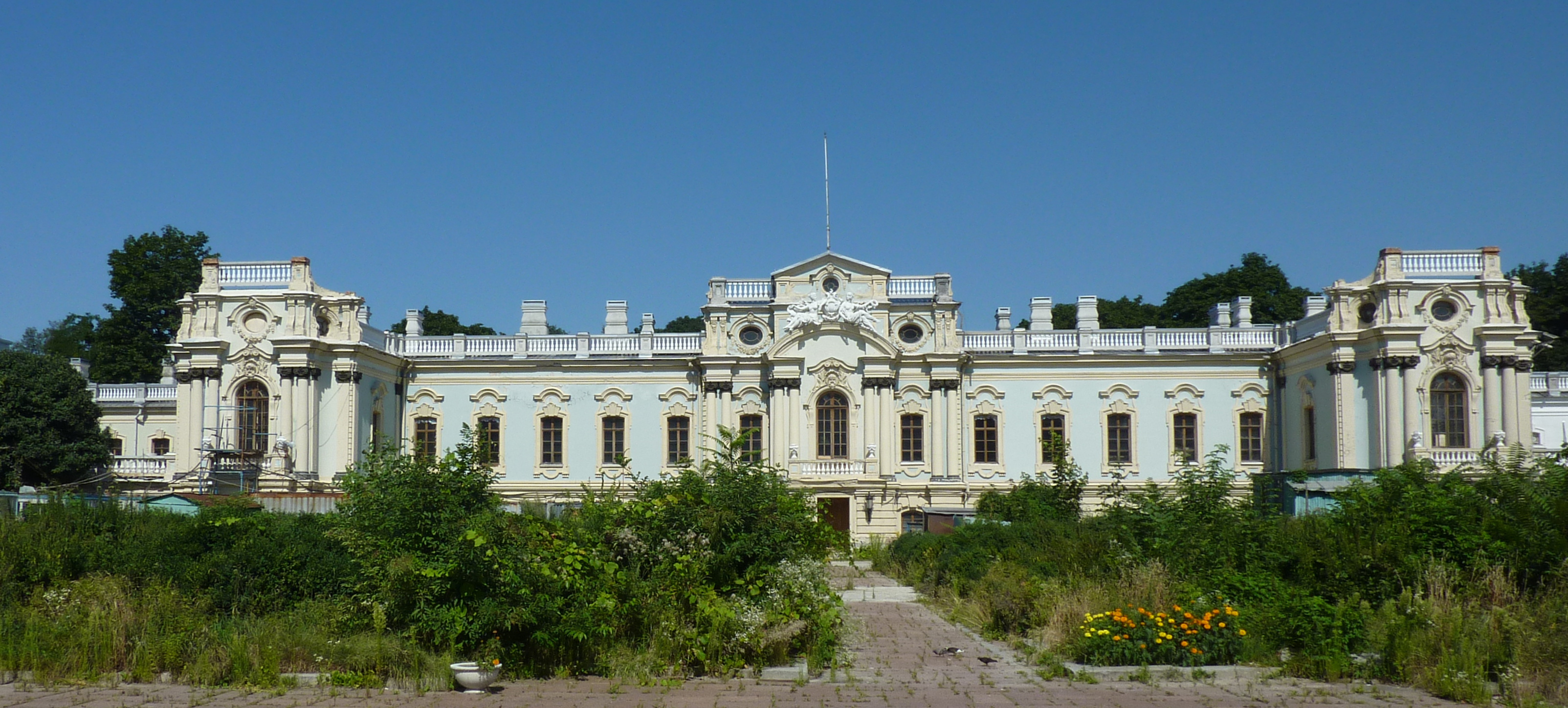 Pałac Maryjski w Kijowie, elewacja południowa